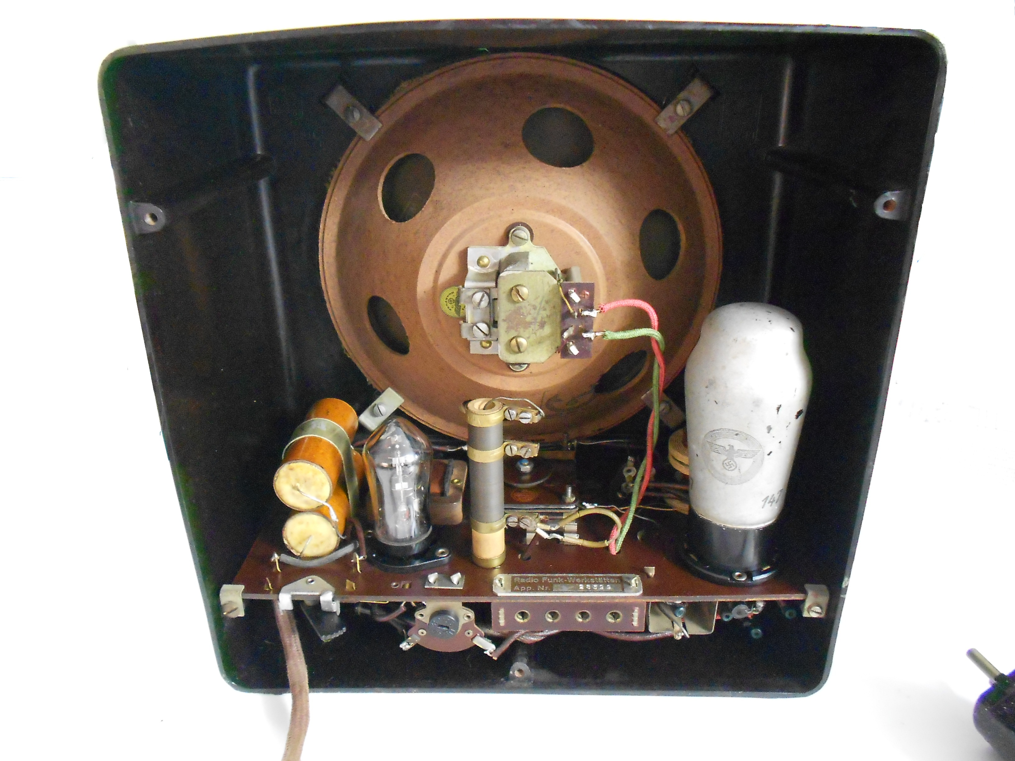 DKE 1938 GW 110/240 VOLTS continua o alternata prodotto dalla Radio Funk-Werkstatten di Berlino (in foto l'apparecchio N°28599 di mia proprietà). Notare la presenza di due sole valvole, a sinistra la Vy 2 diodo rettificatore, a destra con lo stemma del Deutsches Reich la VCL 11, triodo + tetrodo, costruita specificatamente per questo tipo di apparecchio radioricevente.